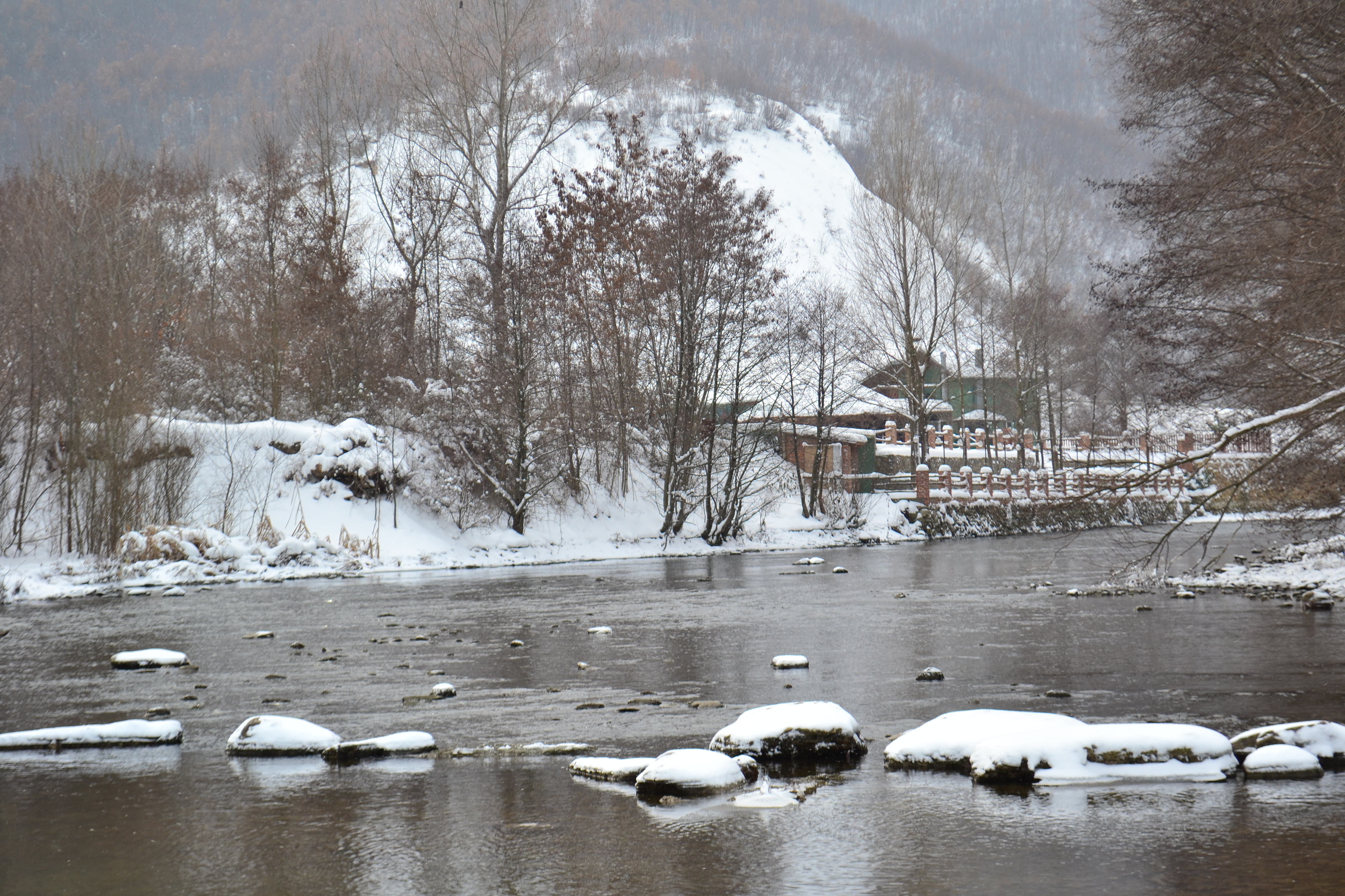 Pamje e lumit Ibër, në fshatin Koshtovë në Mitrovicë